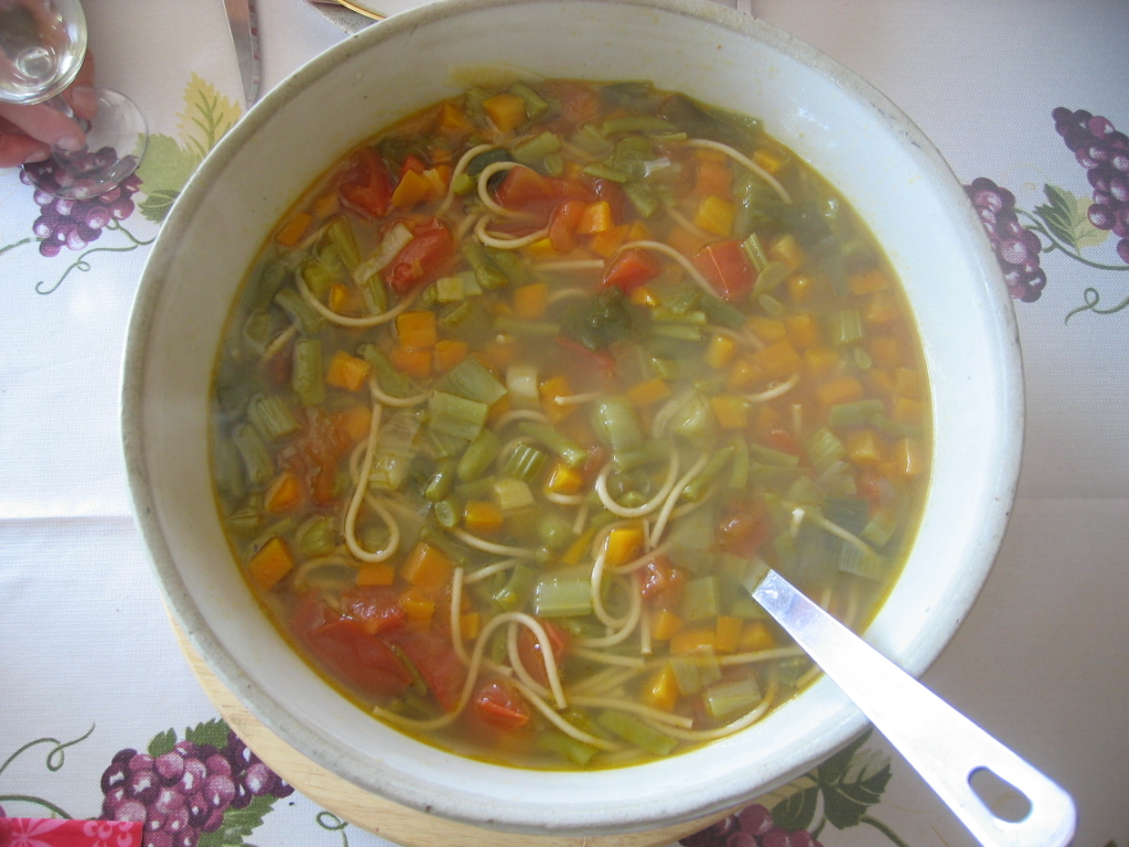 Soupe Minestrone de Marie Therese Grappe